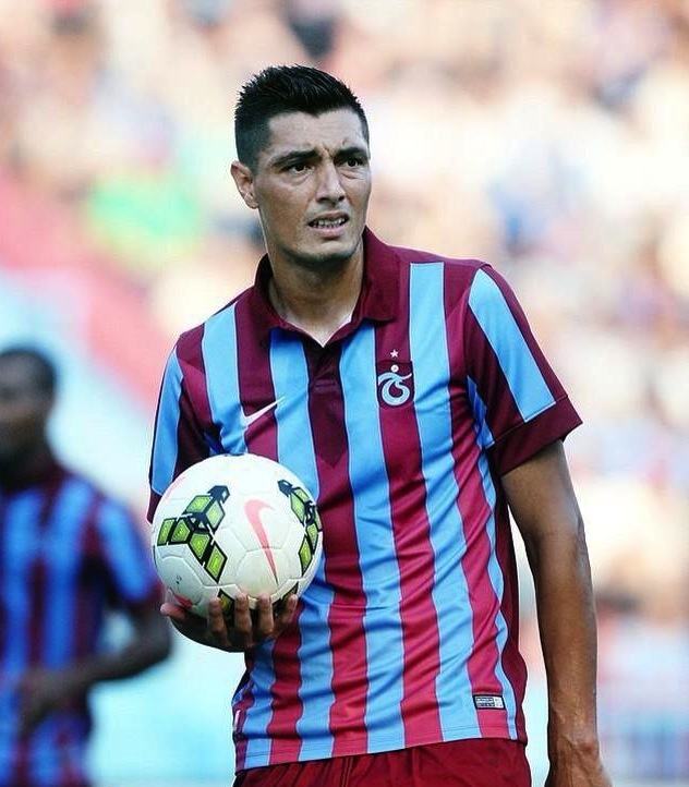 Óscar Cardozo - Trabzonspor